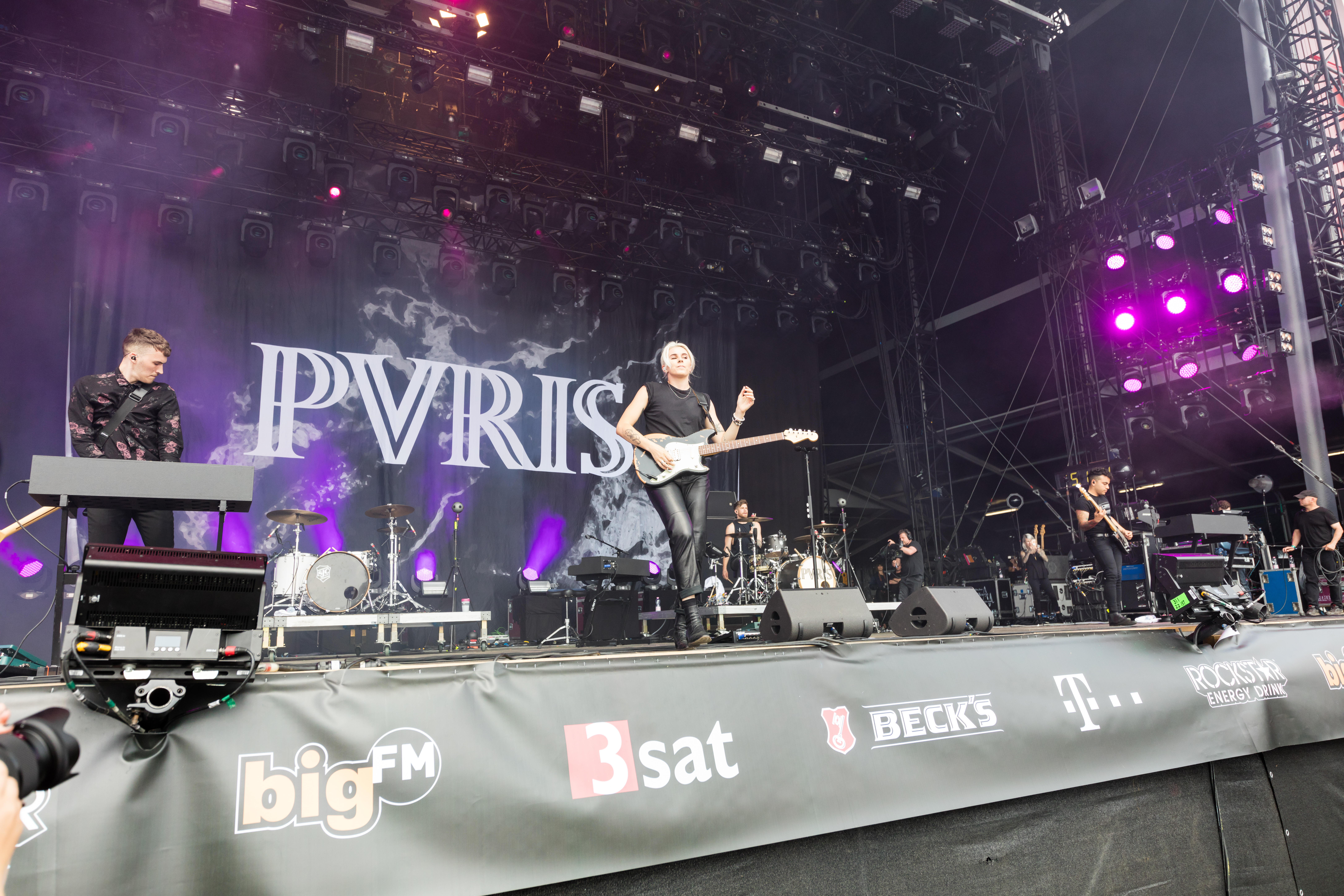 PVRIS @ Rock am Ring 2018